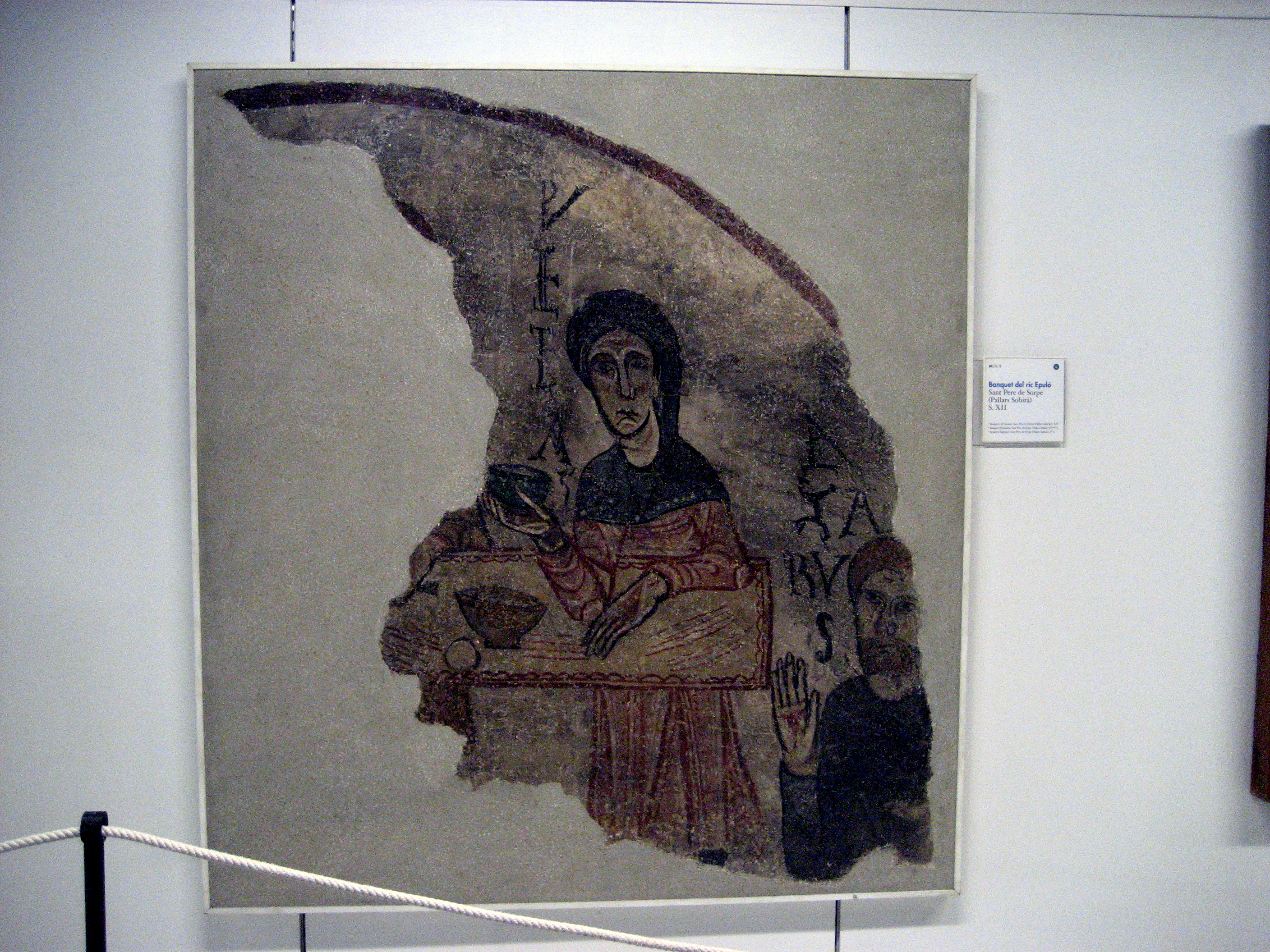 Pintura mural románica representando el Banquete de Epulo procedente de la iglesia de Sant Pere de Sorpe del Pallars Sobirà en la província de Lleida de Cataluña (España) Museo Diocesano de Urgel